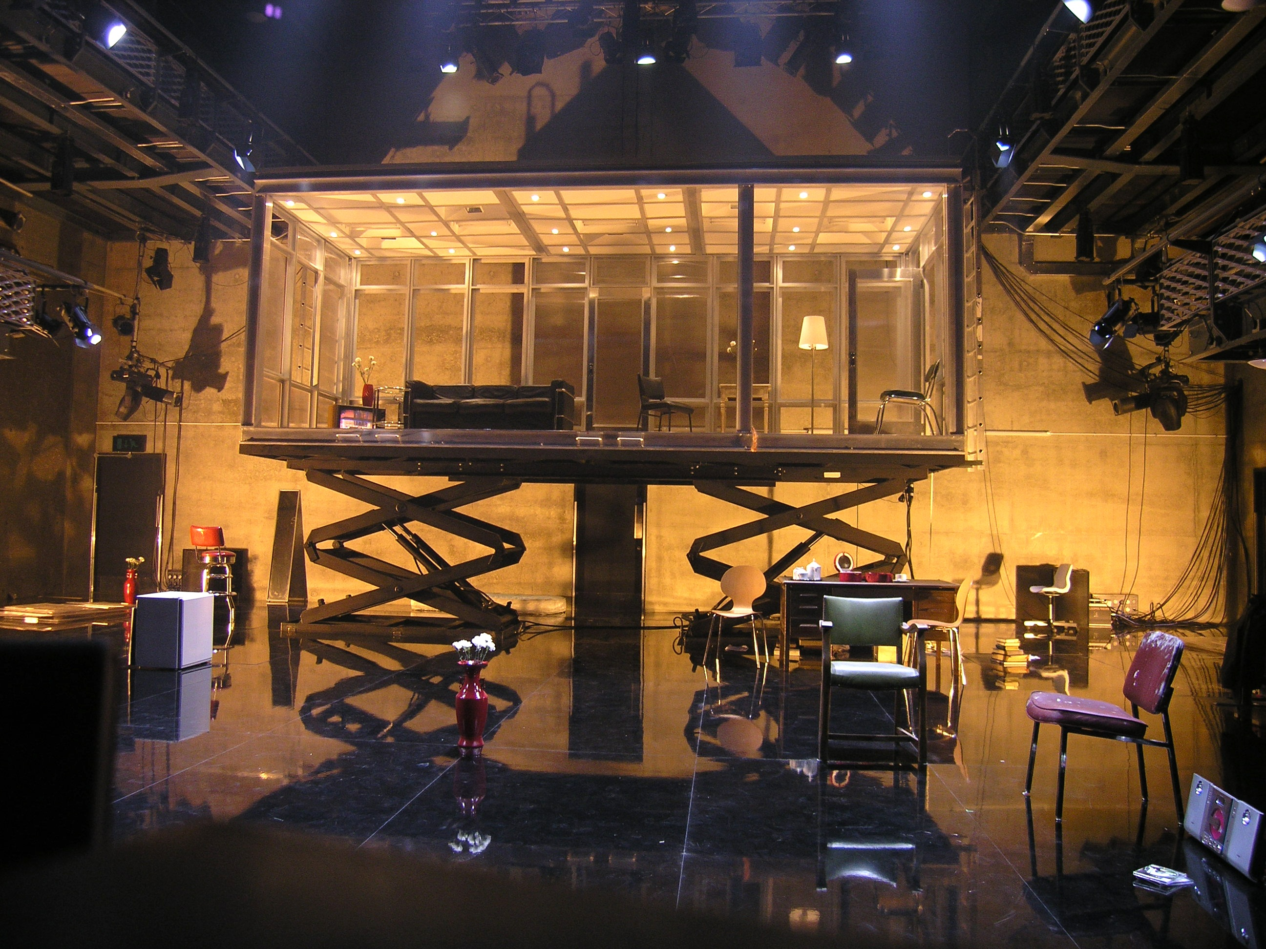 מחלת נעורים, במאי גדי רול, מעצב תפאורה רוני תורן, מעצבת תלבושות מוניקה ניסבט, מעצב תאורה מרק האוולנד, קובנטרי, אנגליה 2007